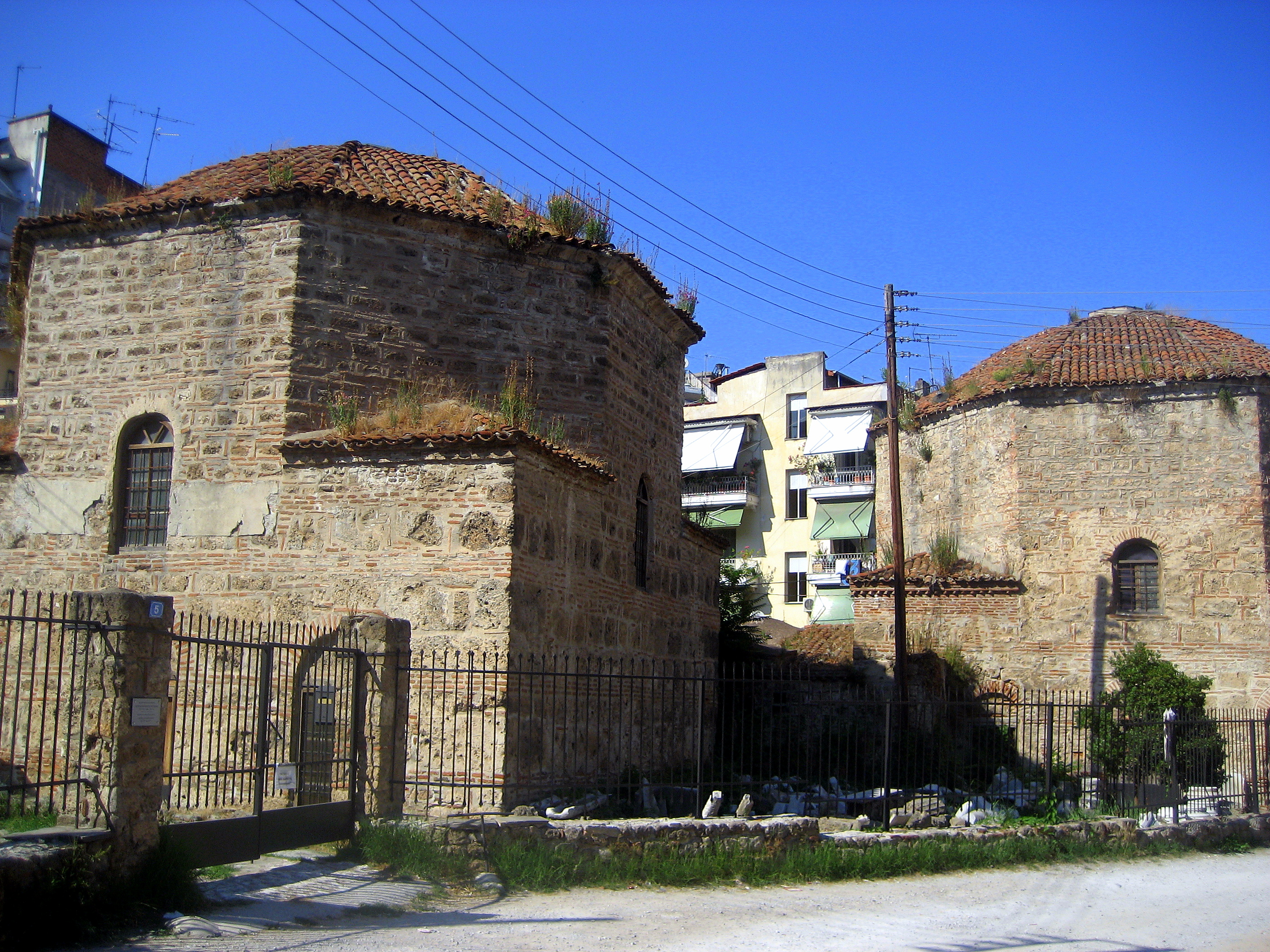 Οθωμανικά Λουτρά Βέροιας«Δίδυμα Λουτρά»